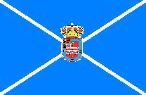 Bandera de Nigrán (Pontevedra). Elementos empleados: bandera (antigüa versión realizada por mi), escudo (versión del escudo de Xelo2004 de Galipedia).